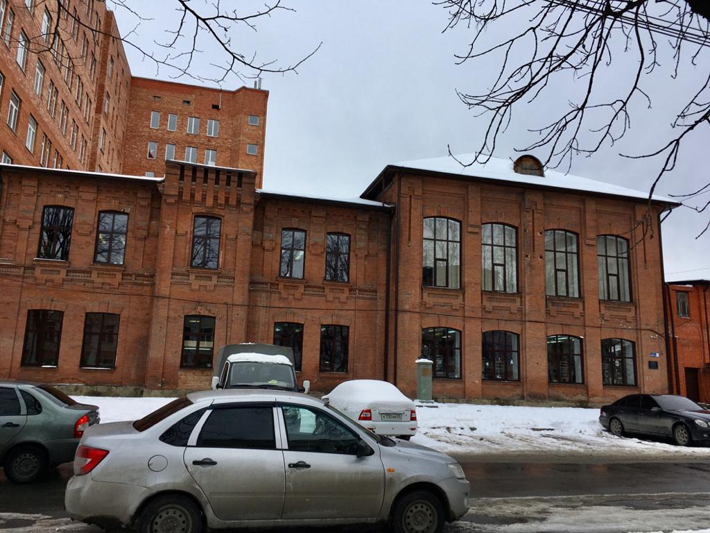 Общежитие ("Горско-Пушкинское") Общества по распространению образования и технических сведений среди горцев Терской области, построенное в ознаменование 100-летия со дня рождения А.С.Пушкина: улица Церетели, 16, Владикавказ, Северная Осетия